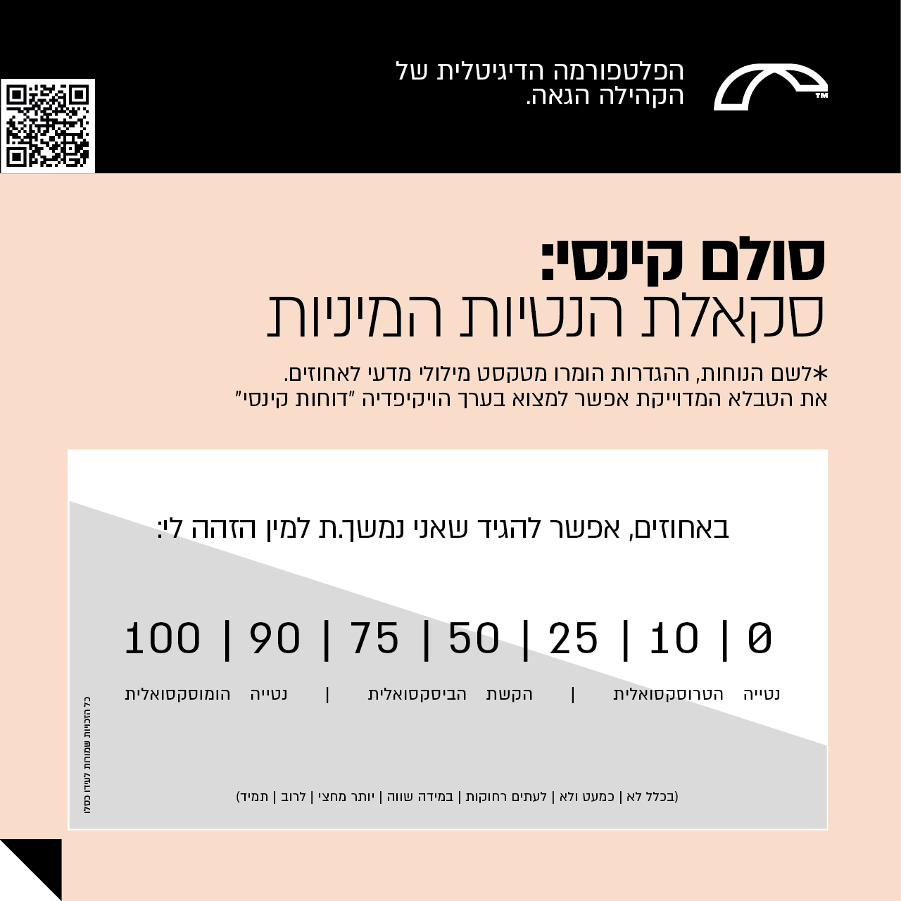 המחשה של סולם קינסי לפי אחוזים